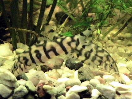 Autor: Arkadiusz Lipiec from pl.wikipedia